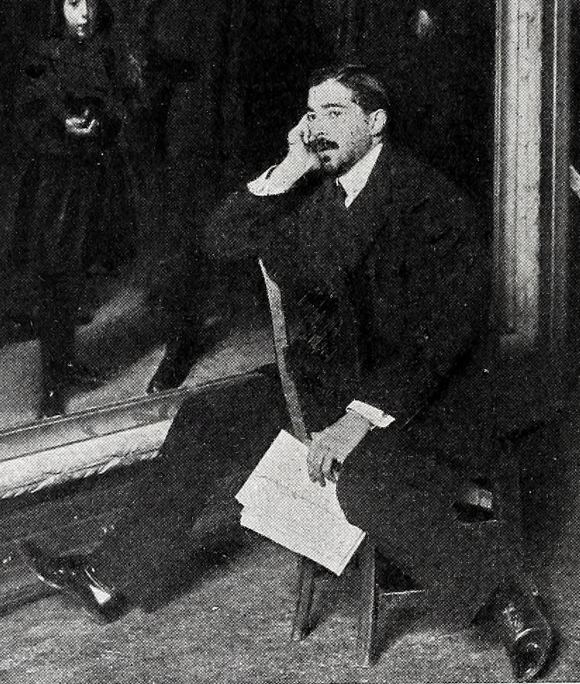 José María López Mezquita.